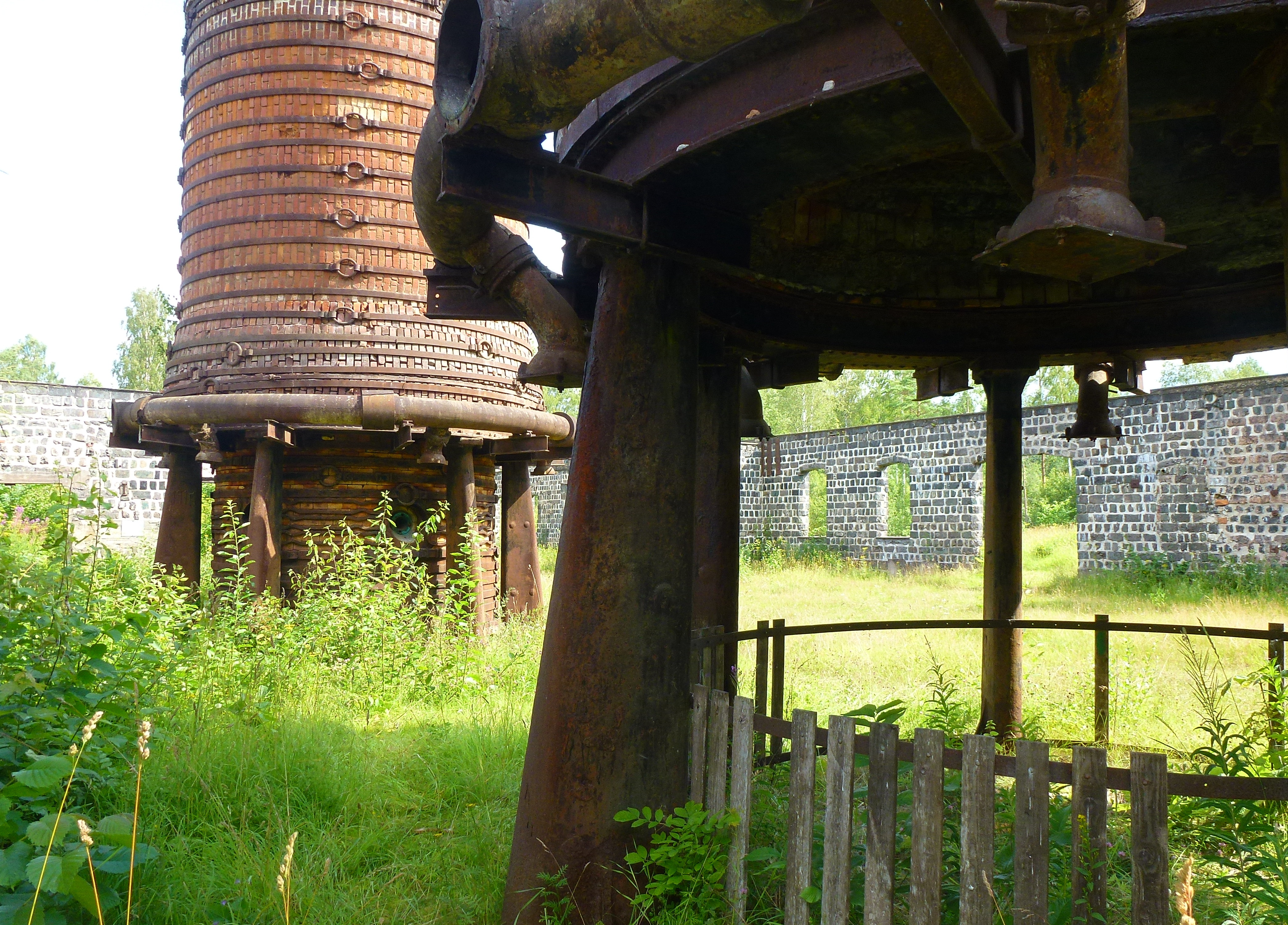 Högfors masugnsruin